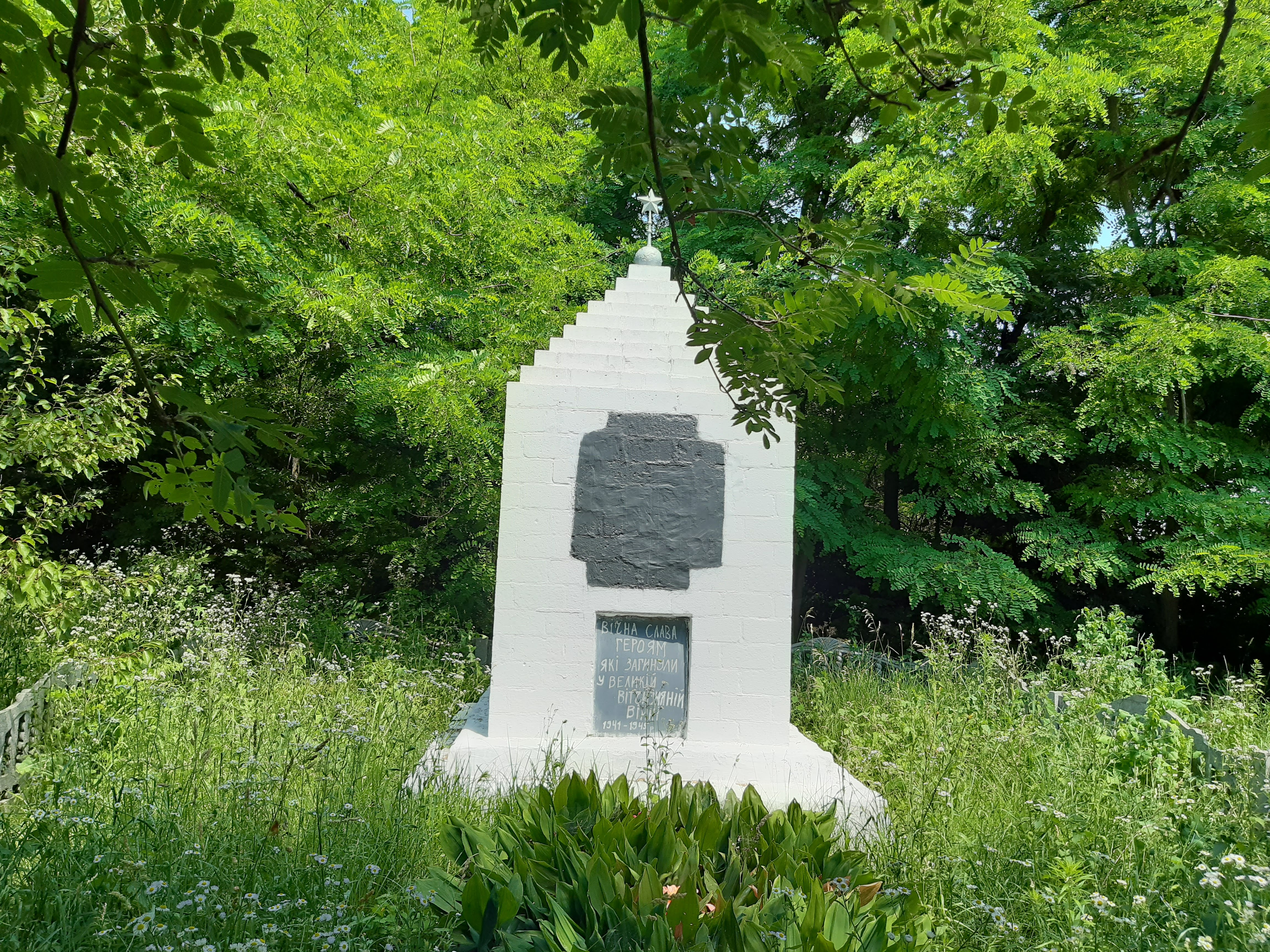 Пам’ятний знак загиблим у Другій світовій війні. Маціївка, Прилуцький район, Чернігівська область. Червень 2019